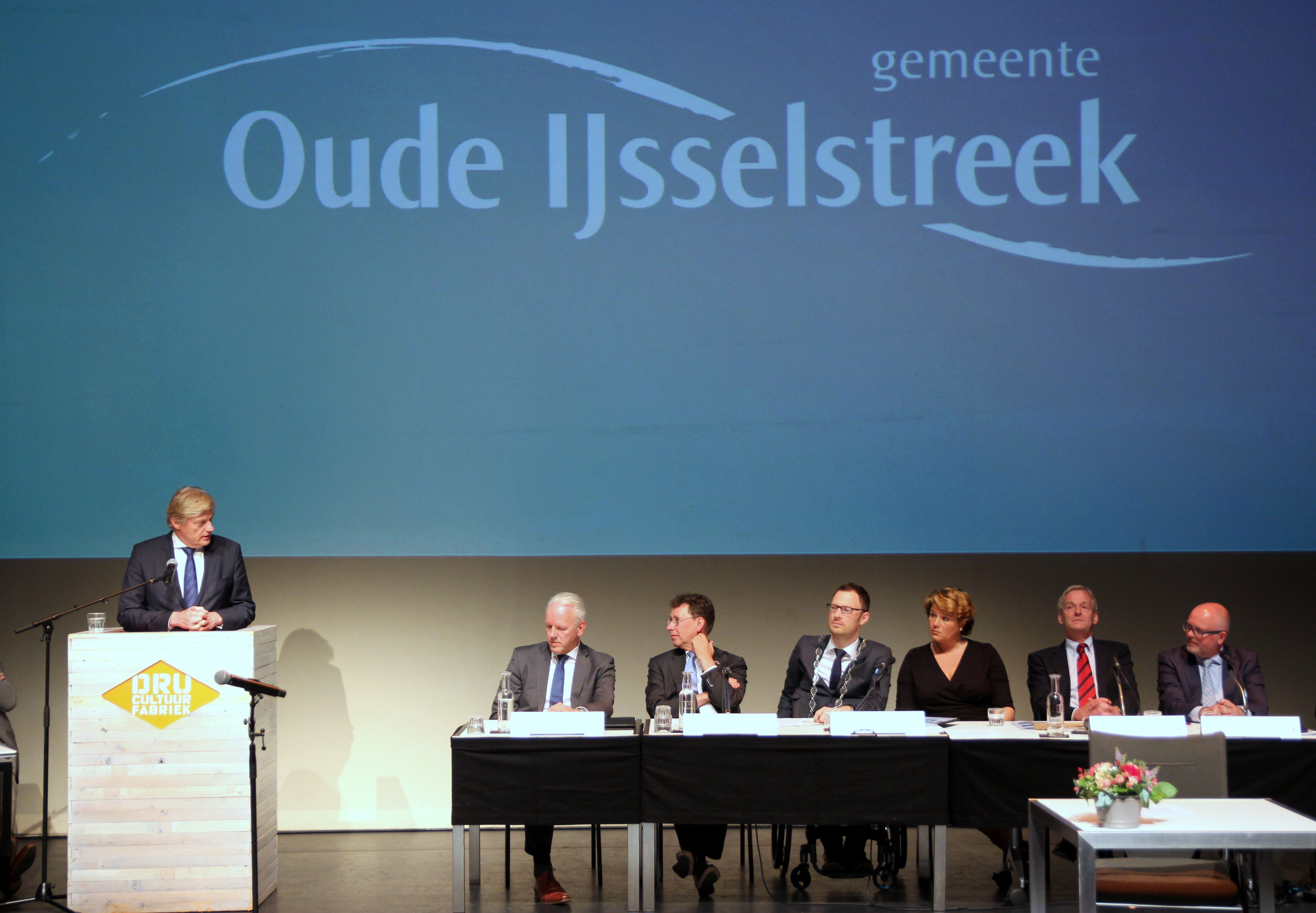 Installatie van Otwin van Dijk als burgemeester van de gemeente Oude IJsselstreek in de theaterzaal van de DRU in Ulft. Van link: staatssecretaris Martin van Rijn, chef kabinet Hein Tromp, commissaris van de koning Clemens Cornielje, burgemeester Otwin van Dijk, Karin van Dijk, de voormalige waarnemende burgemeester Steven de Vreeze, de interim griffier Marco Looman.